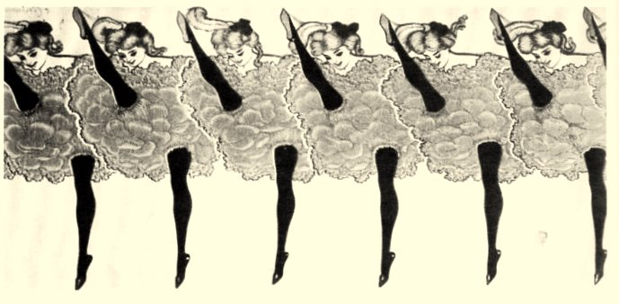 affiche art-nouveau fin XIXe siècle